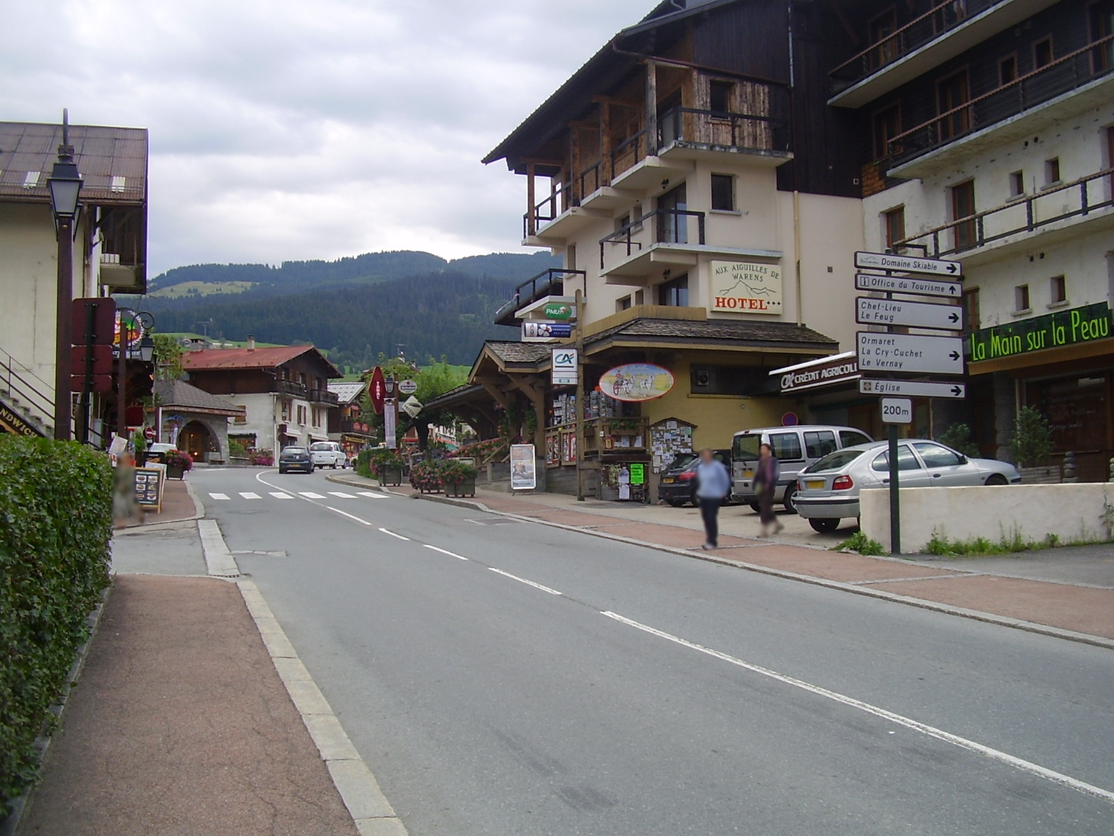 La RD 1212 (ex-RN 212) à Combloux, route de Sallanches mais il s’agit de la direction de Megève. L’image a été volontairement modifiée avec flou sur les personnes et les plaques d’immatriculation.